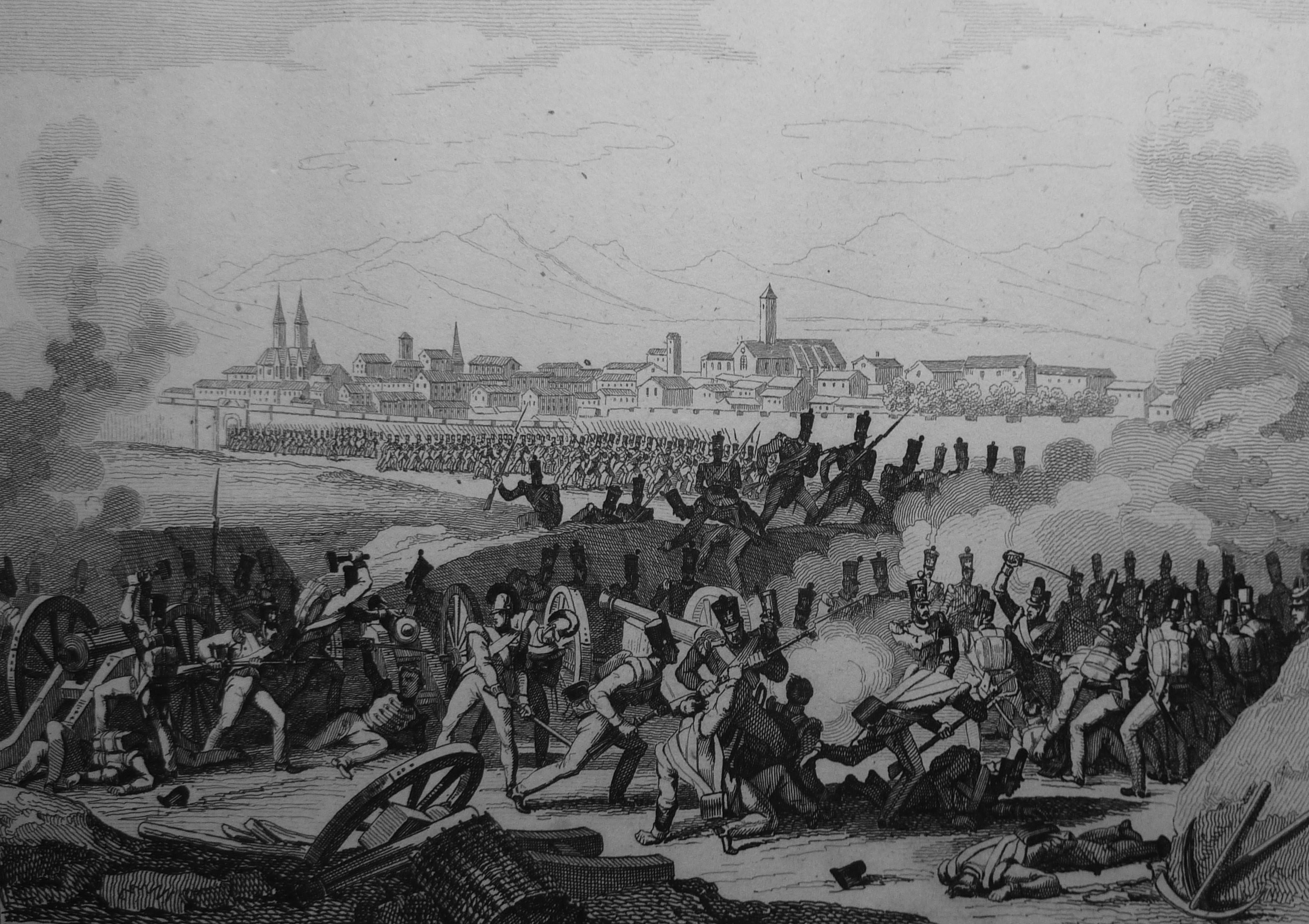 Ilustración de Martinet sobre el asedio a la ciudad de Pamplona de 1823.